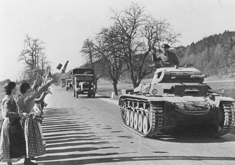 Österreich: stürmischer Jubel empfängt die deutschen Formationen in Österreich. 13.3.1938 Presse-Bild-Zentrale